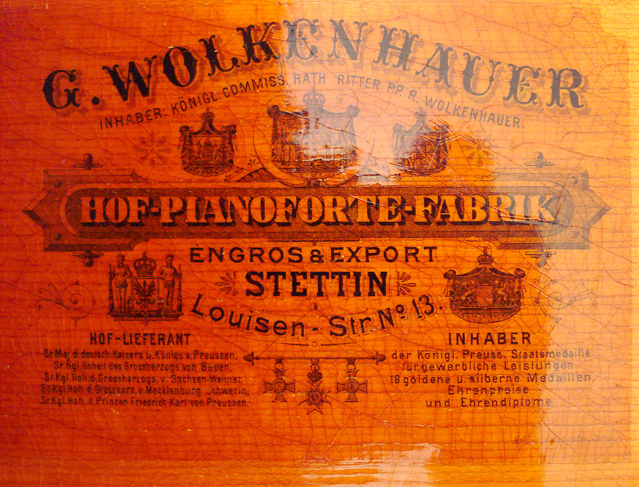 Napis, logo fabryki Wolkenhauer, zdjęcie pochodzi z pianina nr 50108, dolny lewy fragment instrumentu, dno rezonansowe; rok produkcji pianina prawdopodobnie 1888, własność instrumentu - Radosław Bugajski